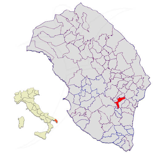 Il territorio del comune di Nociglia in Provincia di Lecce